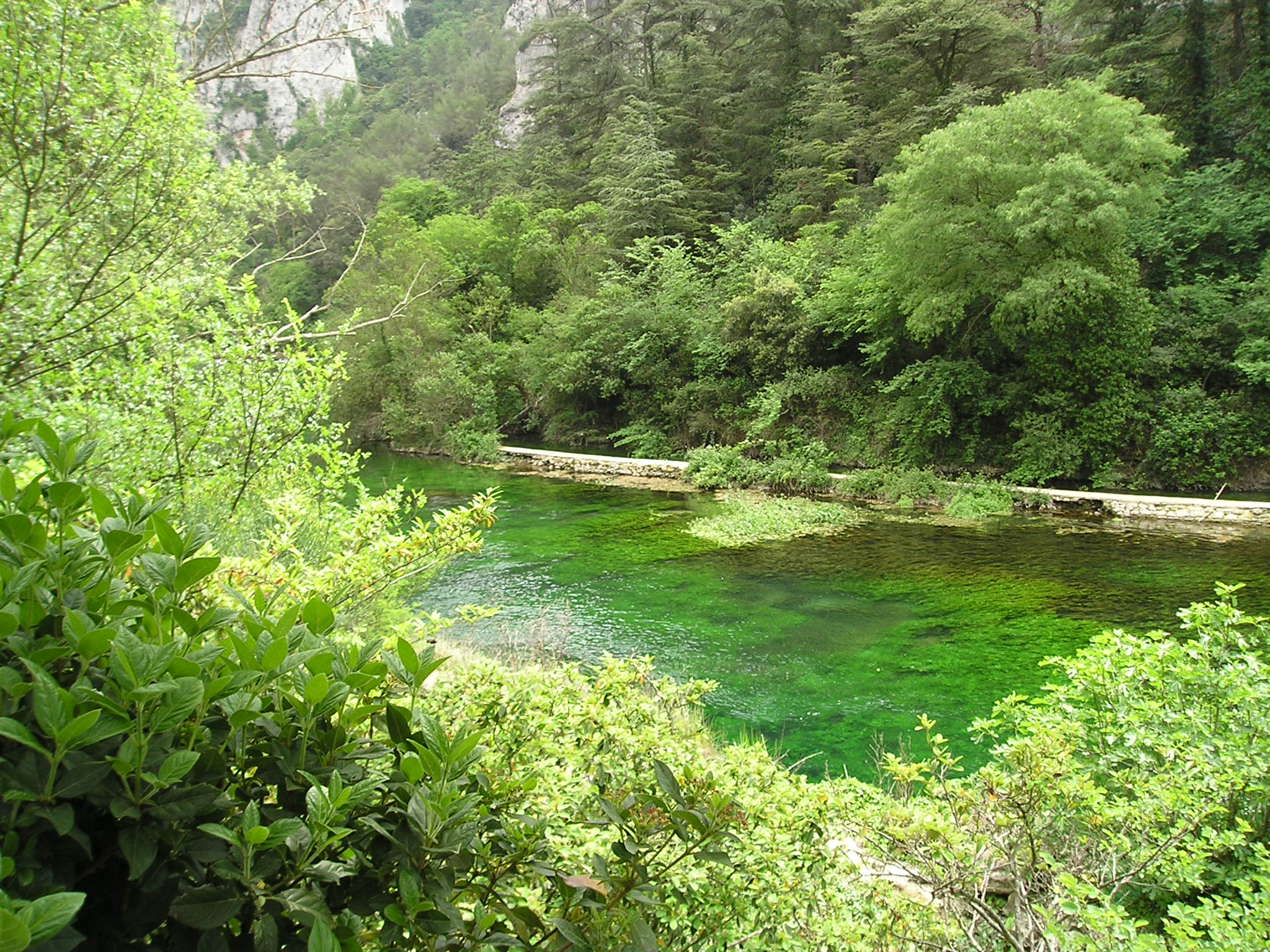 Il fiume "la Sorgue" che ispirò Petrarca ripreso vicino alla sorgente nel Comune di Fontaine-de-Vaucluse; autore:Massimo Macconi.